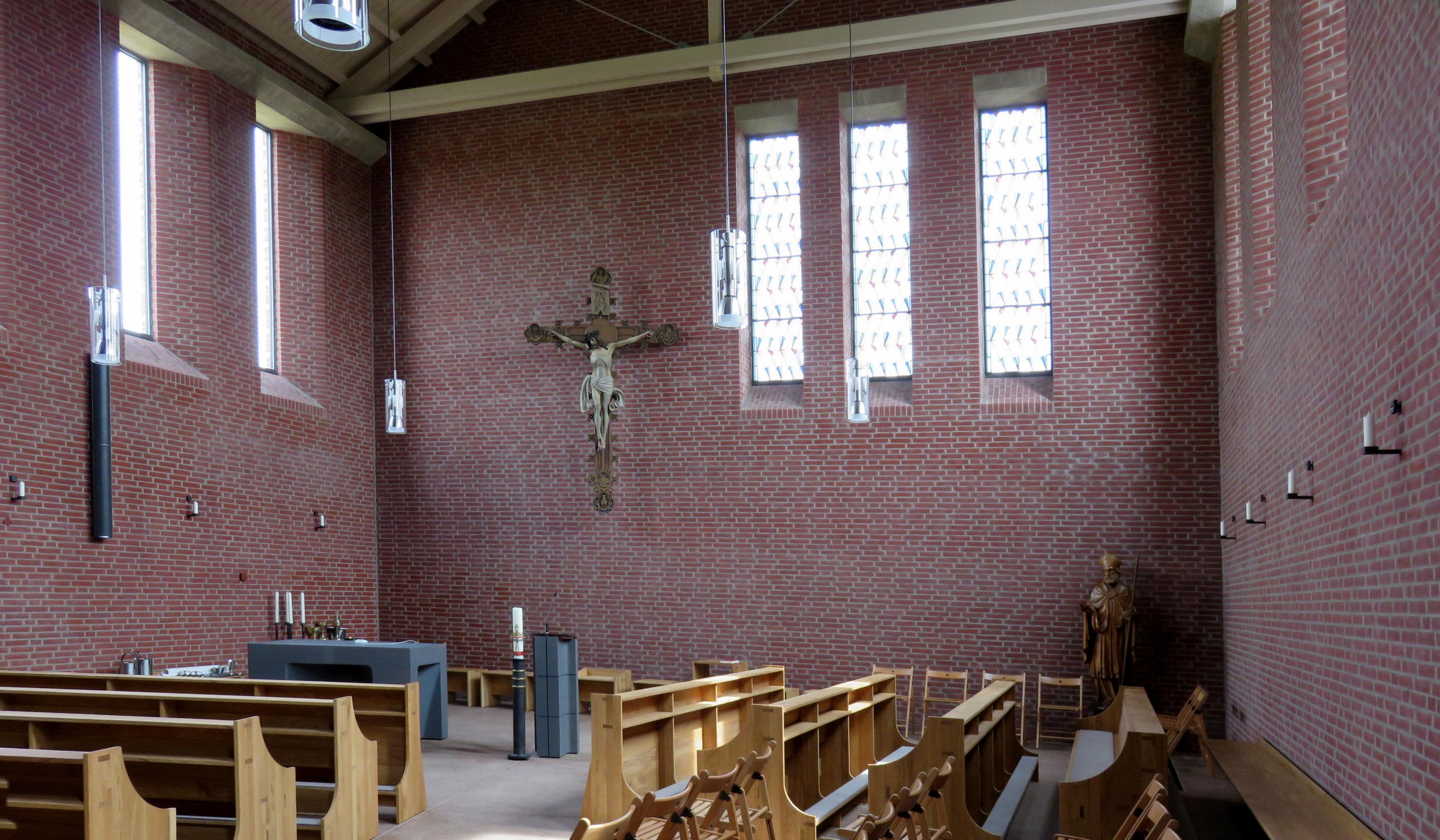 Bild aus der Martinuskapelle in Borschemich (neu)